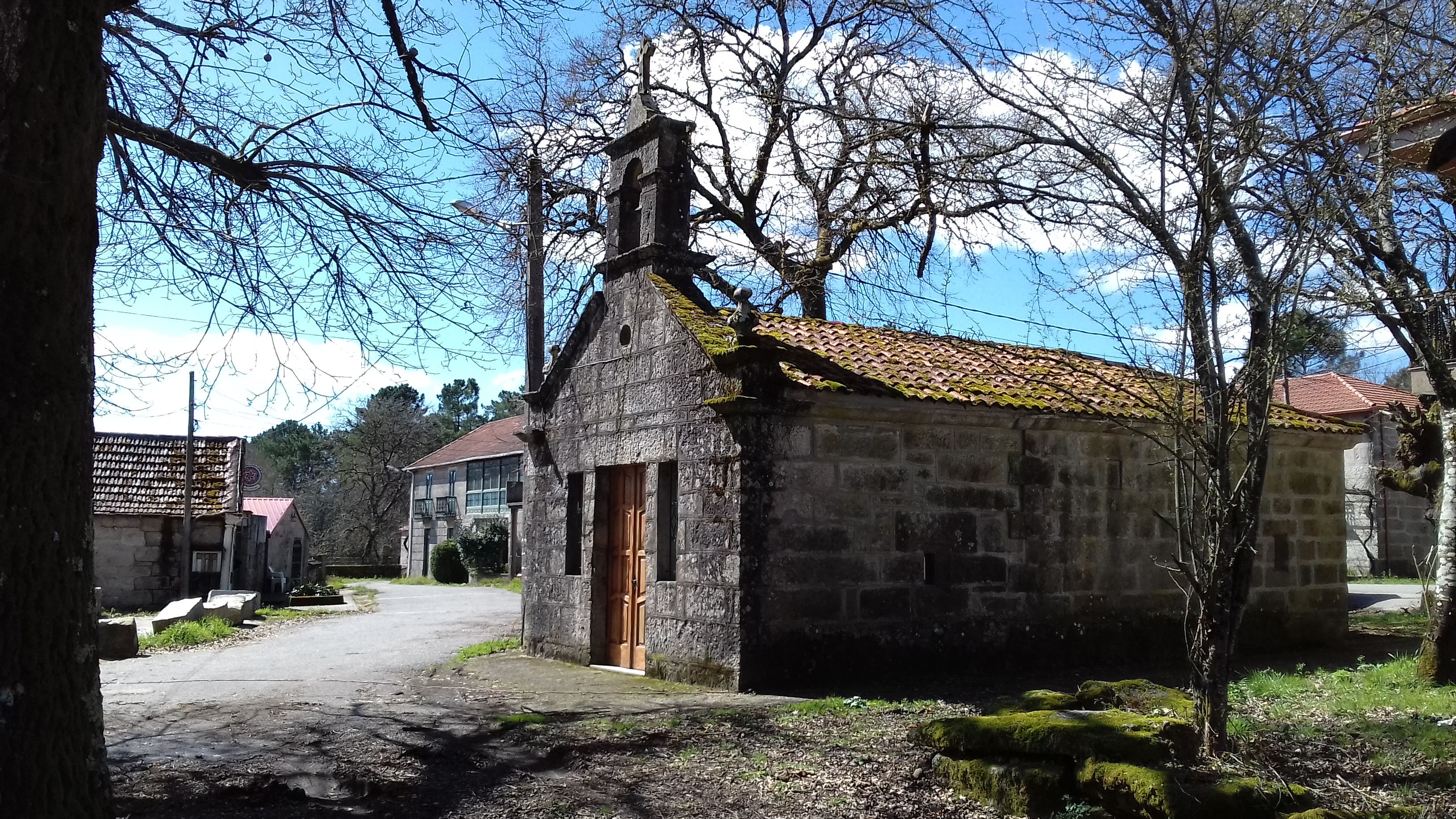 Capela de Santo Antón no Tellado, San Cosmede de Cusanca, O Irixo